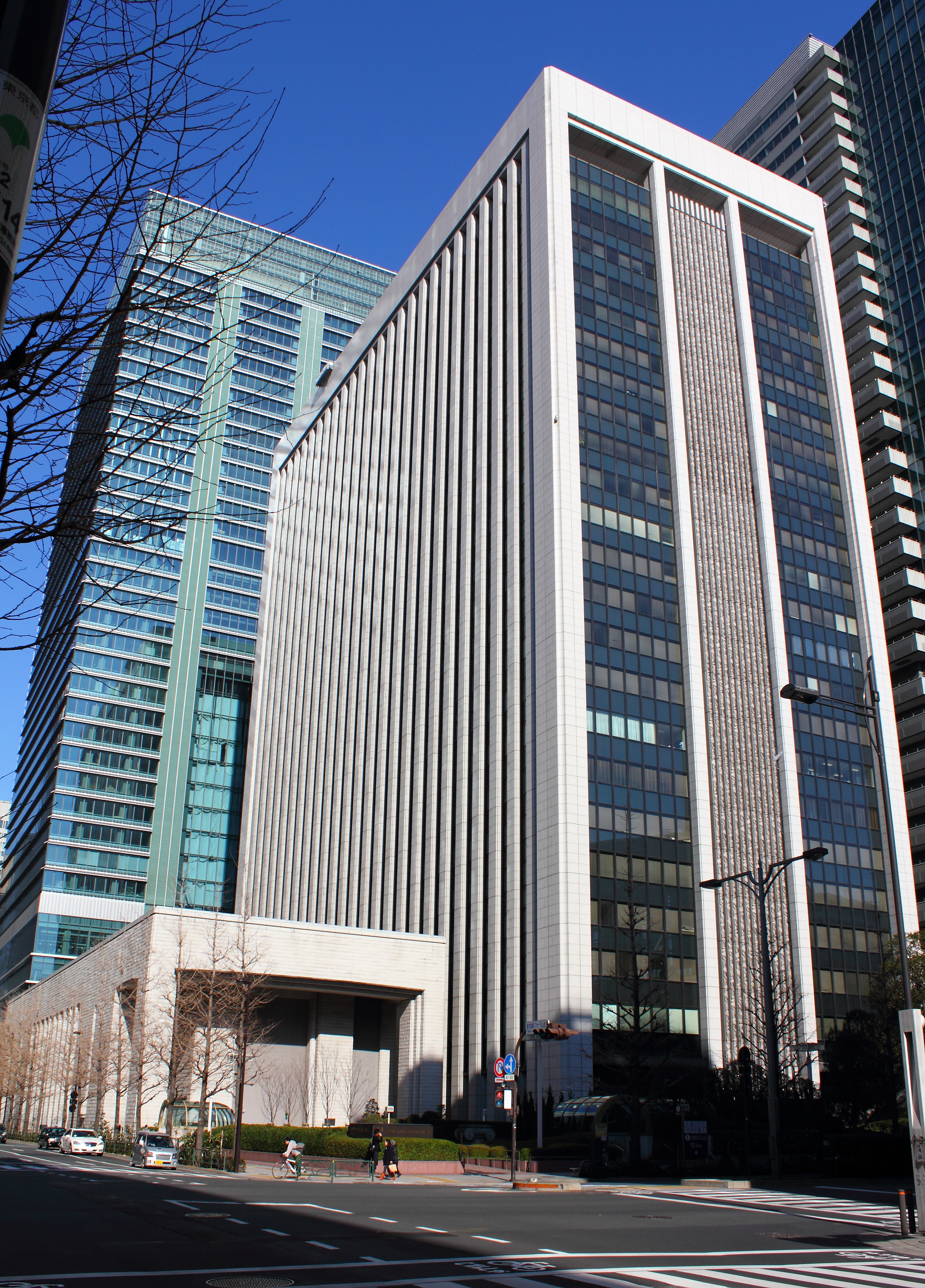 三菱東京UFJ銀行本店（東京都千代田区）